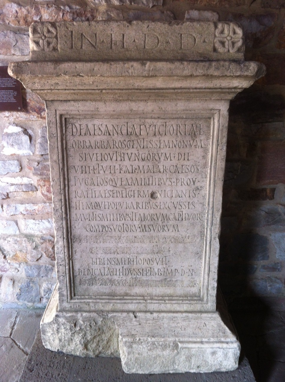 Siegesaltar 1992 in der Weststadt von Augsburg gefunden; Kastell Saalburg, Taunus, Hessen, Deutschland